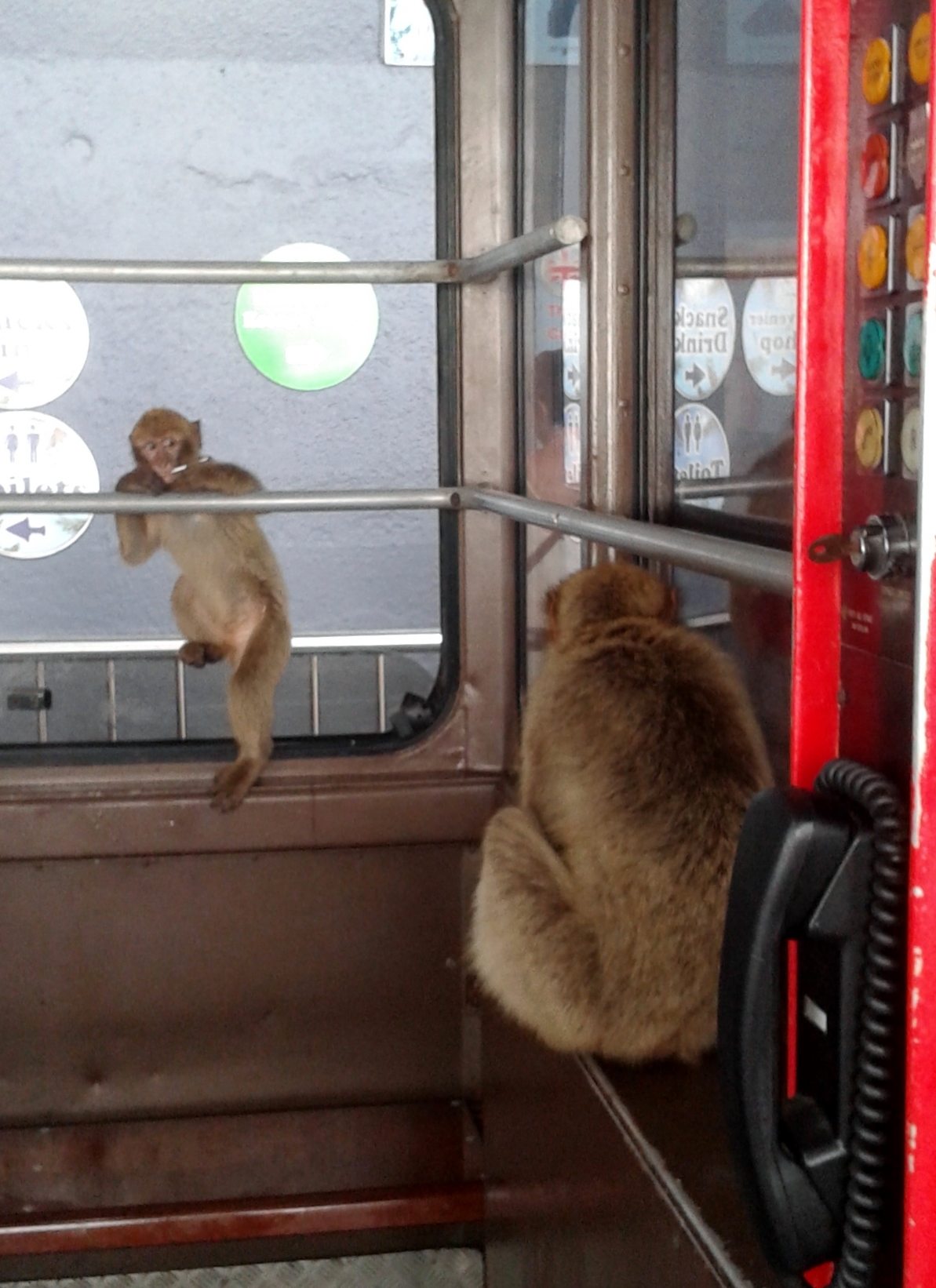 Makakoak jendearekin ohituta daude